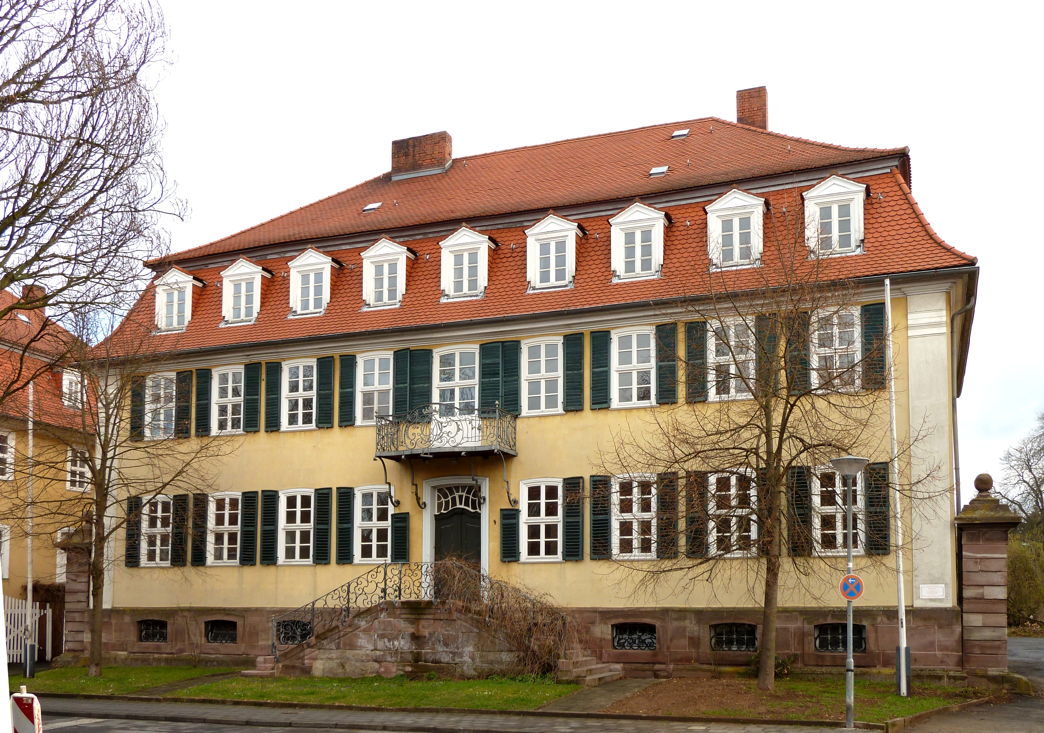 Amtshaus des ehemaligen hessischen Jagdschlosses in Bovenden, Niedersachsen, erbaut 1777 bis 1790